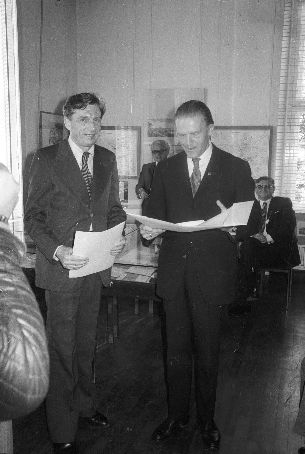 Der Vorsitzende der pommerschen Landsmannschaft Philipp von Bismarck (rechts übergibt im Rantzaubau die Auszeichnung an Klaus Granzow (links).